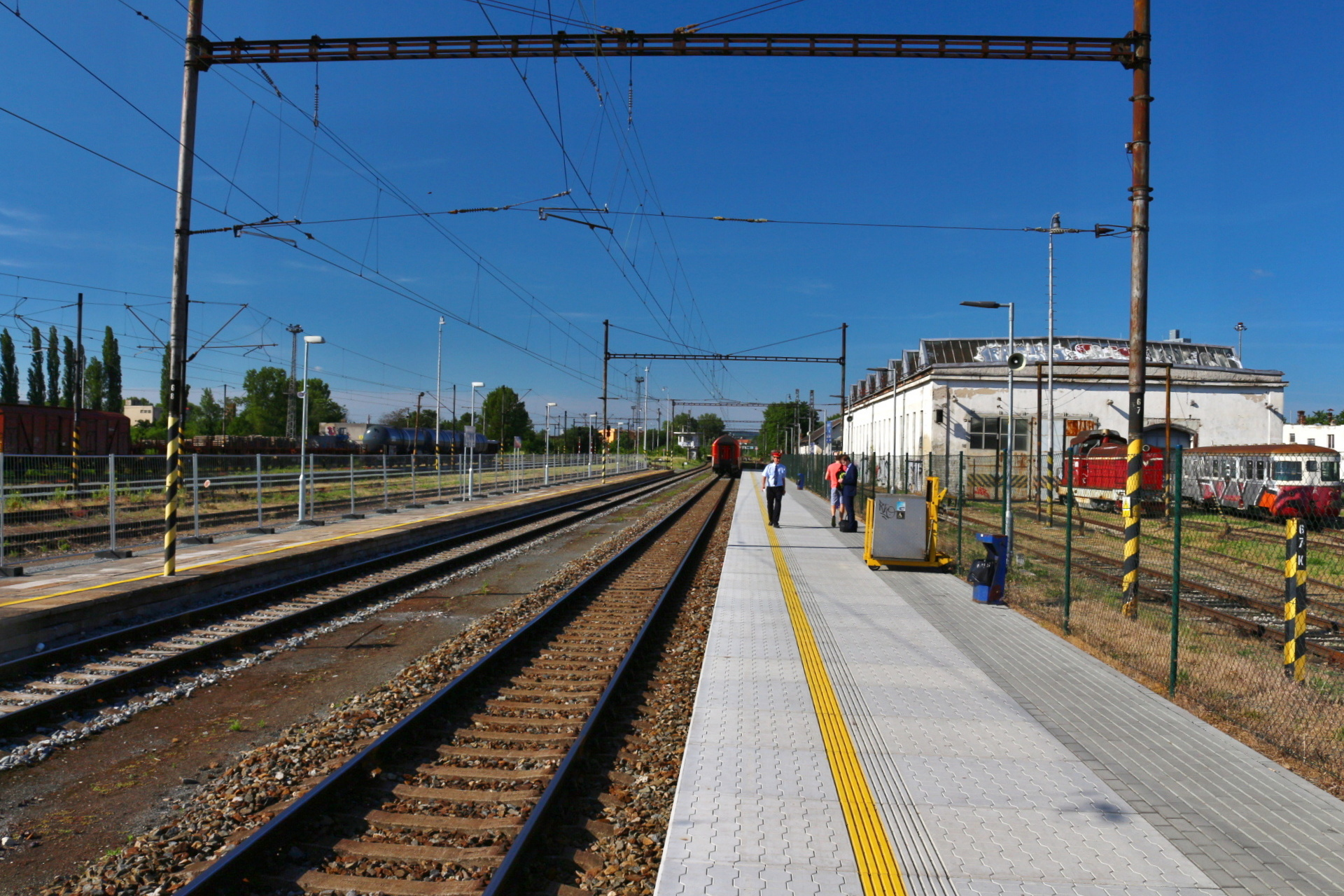 Brno Dolní nádraží